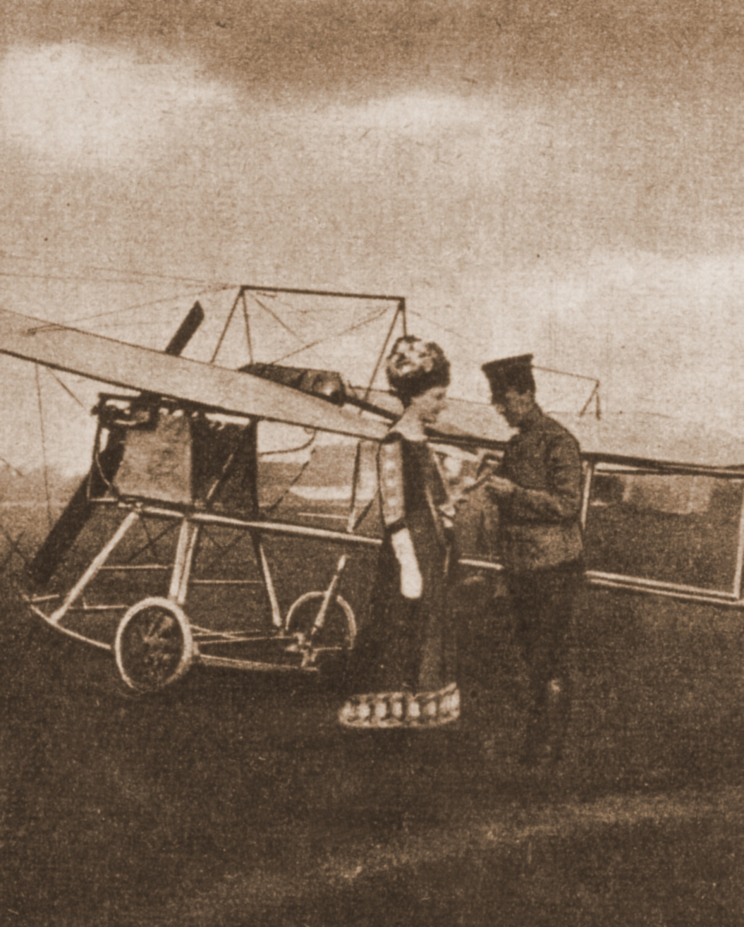 Beschreibung: Karl Ritter mit Frau Erika und seinen selbstgebauten Schulter eindecker nach seiner bestandenen Flugprüfung am 30. September 1911. Quelle: Familienbesitz